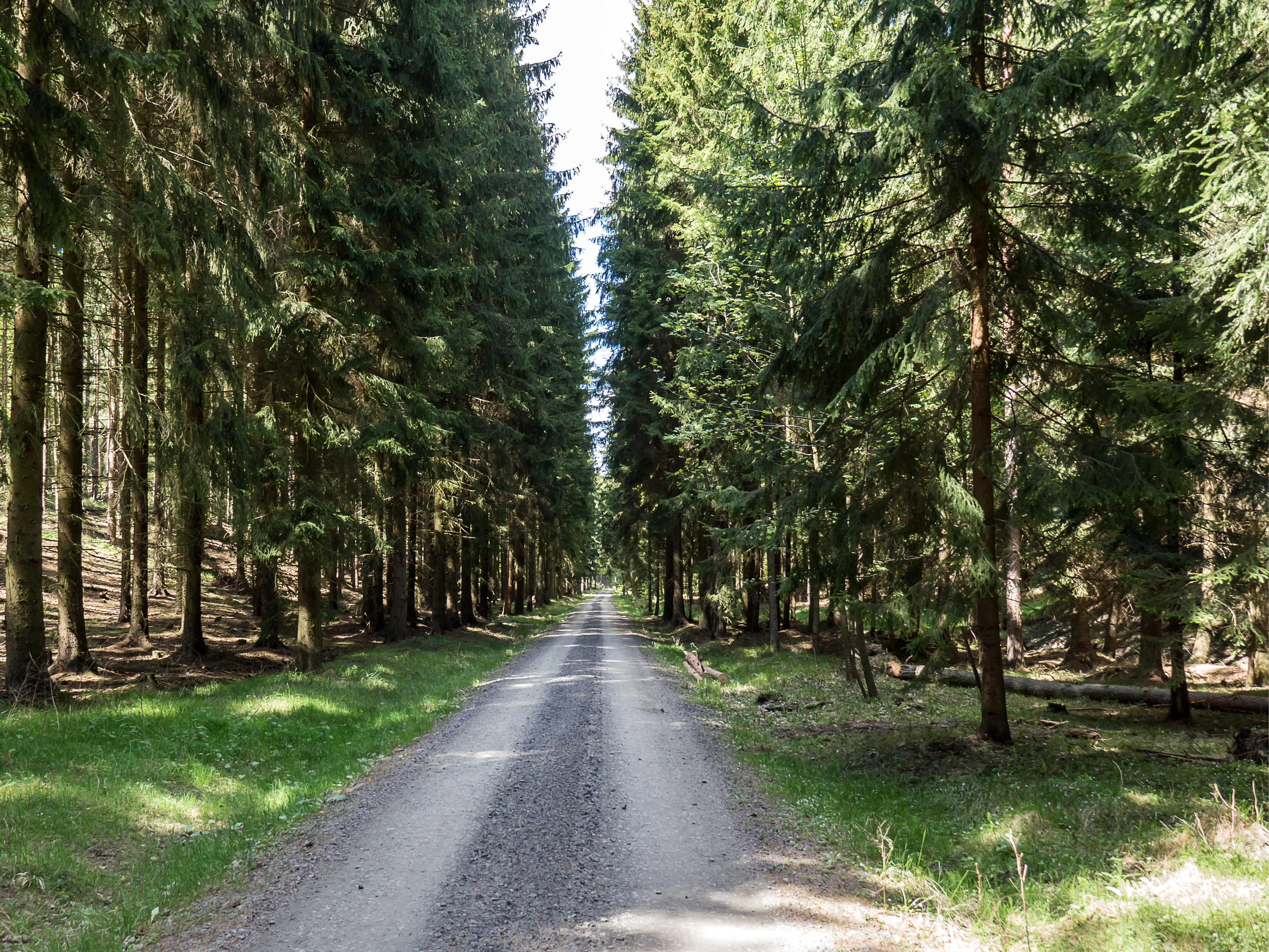 Naturschutzgebiet Nr. 176 Uhlstädter Heide 2 WDPA ID 14502 Sublocation DE-TH